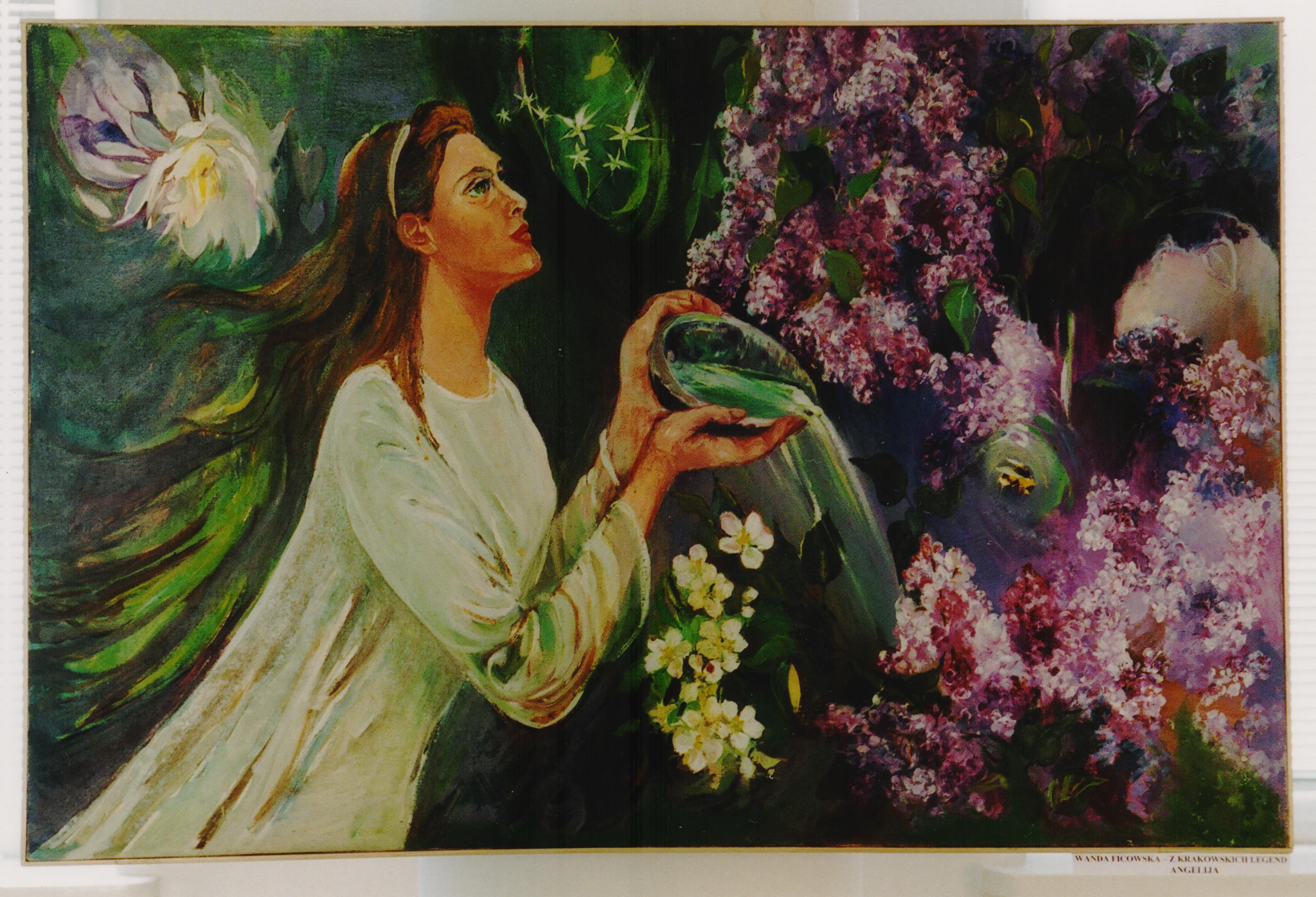 Wanda Ficowska - Z krakowskich legend Angelija (autoportret)